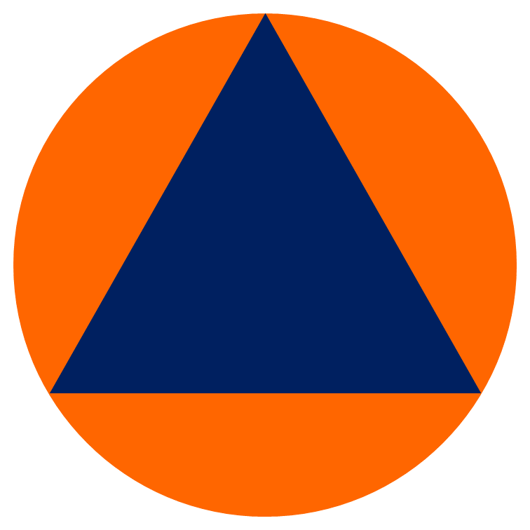 Logo Internazionale che identifica la Protezione Civile